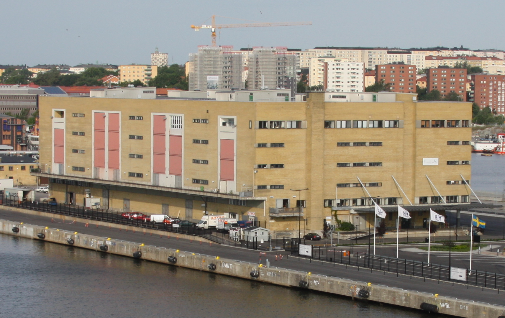 Stockholms frihamn, Frihamnspiren med Magasin 6